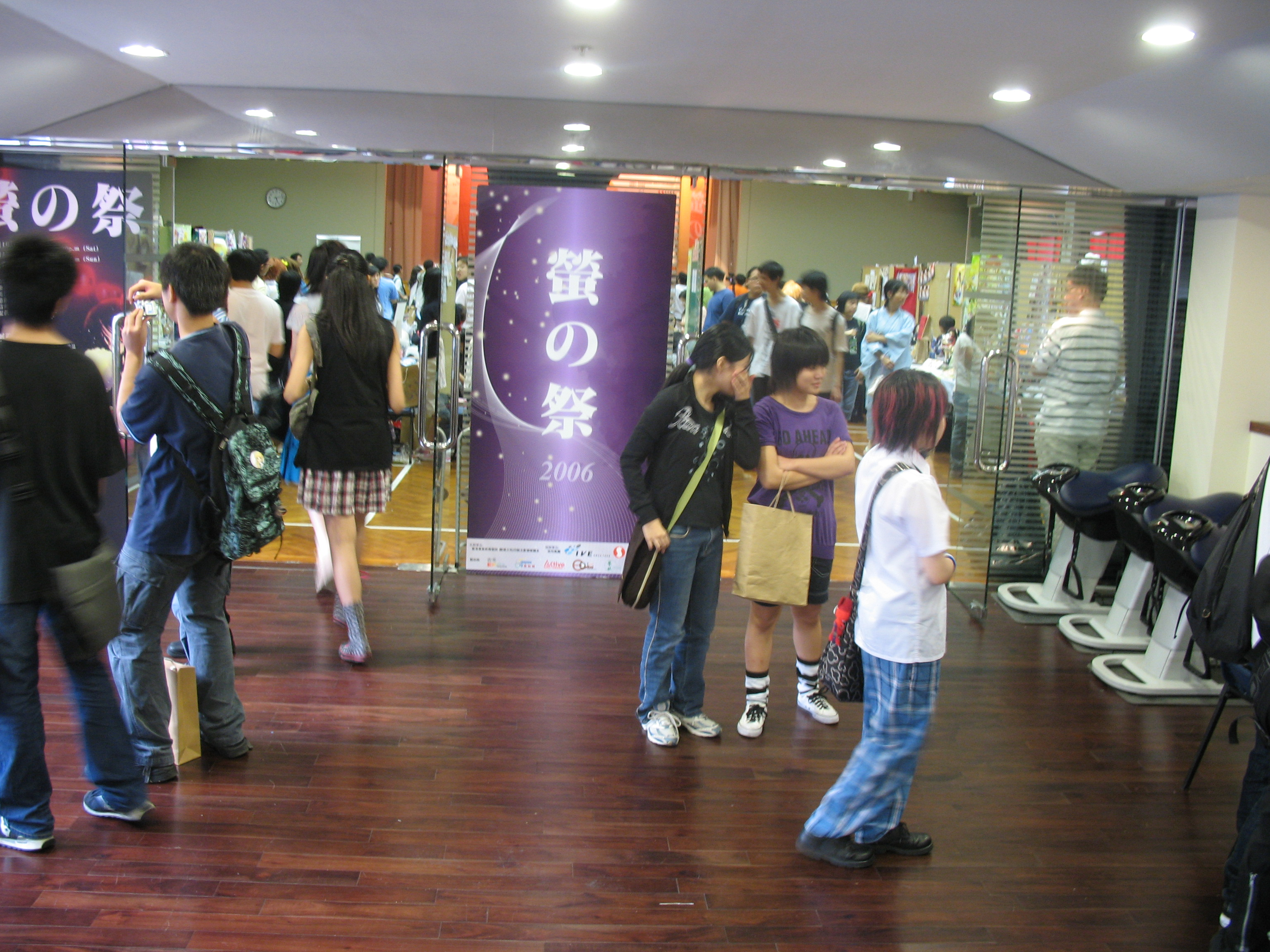 蛍の祭主埸地